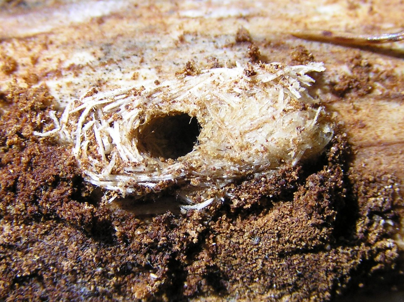 Pissodes notatus Pissodes castaneus, smolik znaczony, Polska